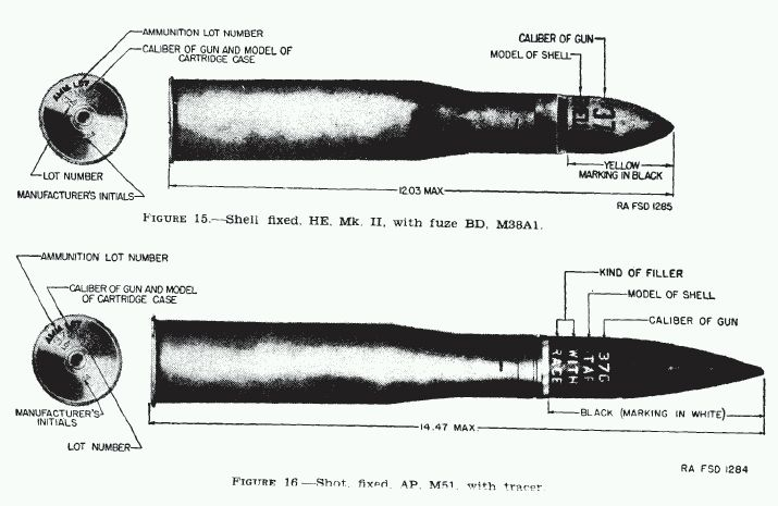 37mm Gun M3/M5/M6 ammunition.